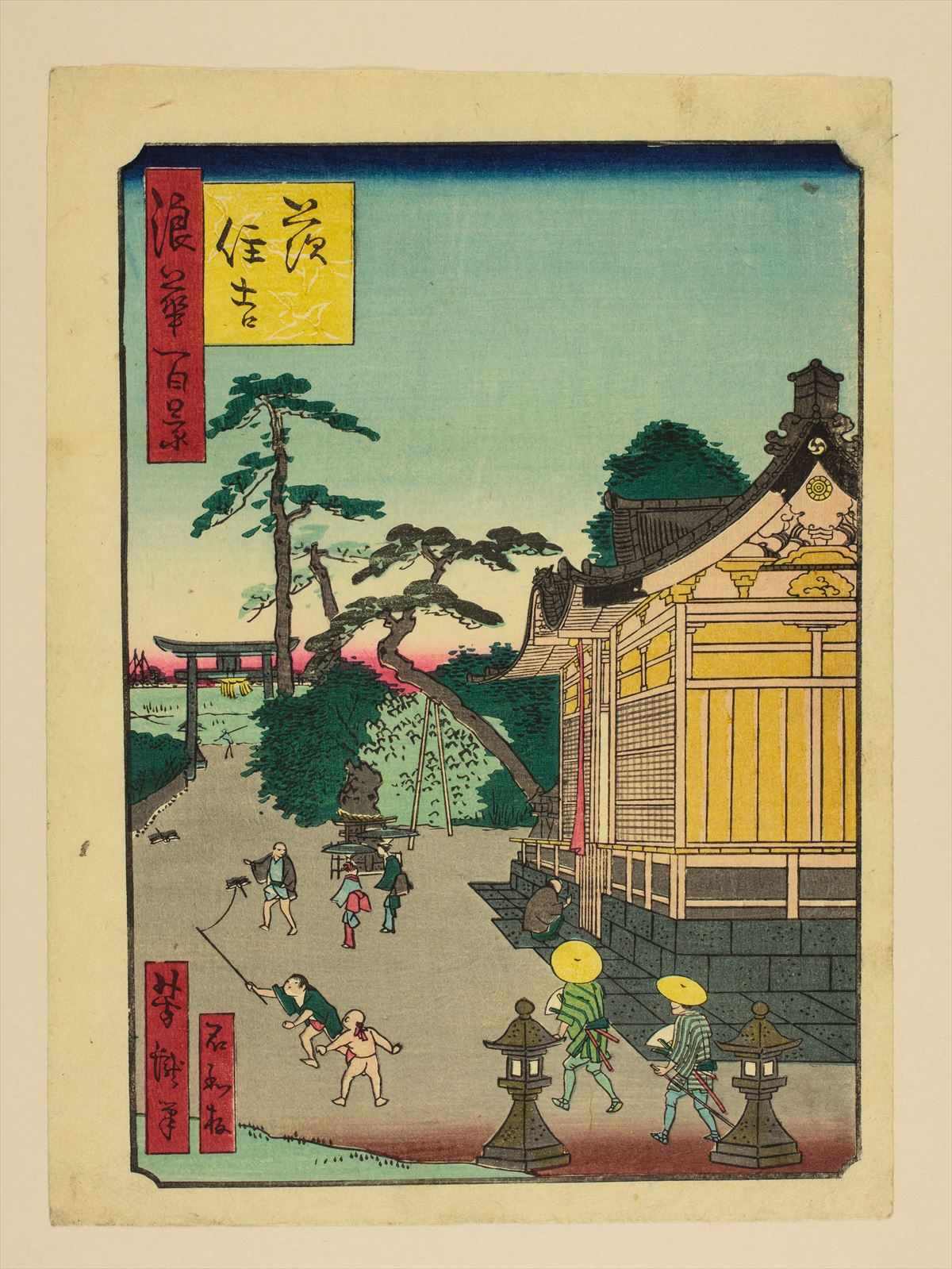 1800年代。里の家芳瀧/画。浪花百景 102枚のうちの1枚。大阪市立中央図書館蔵。